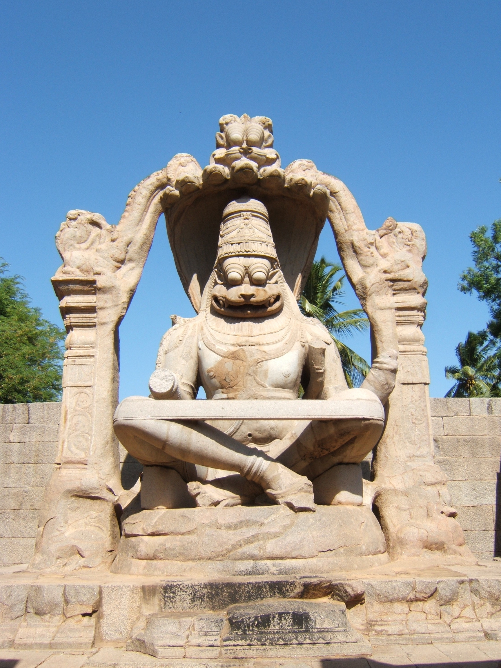 Hampi, Karnataka